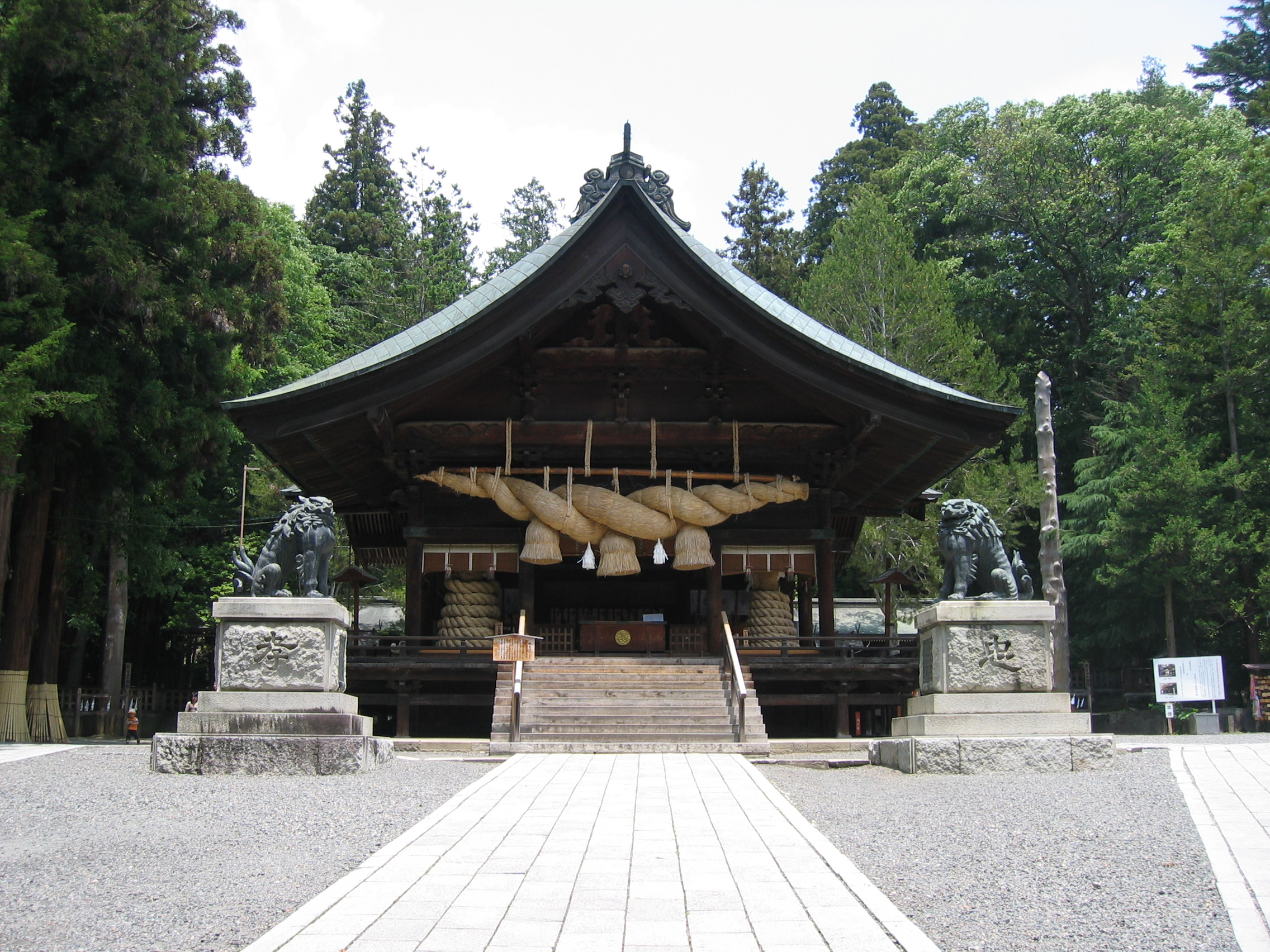 Suwa Taisha Shimosha Akimiya Kaguraden (諏訪大社下社秋宮神楽殿)